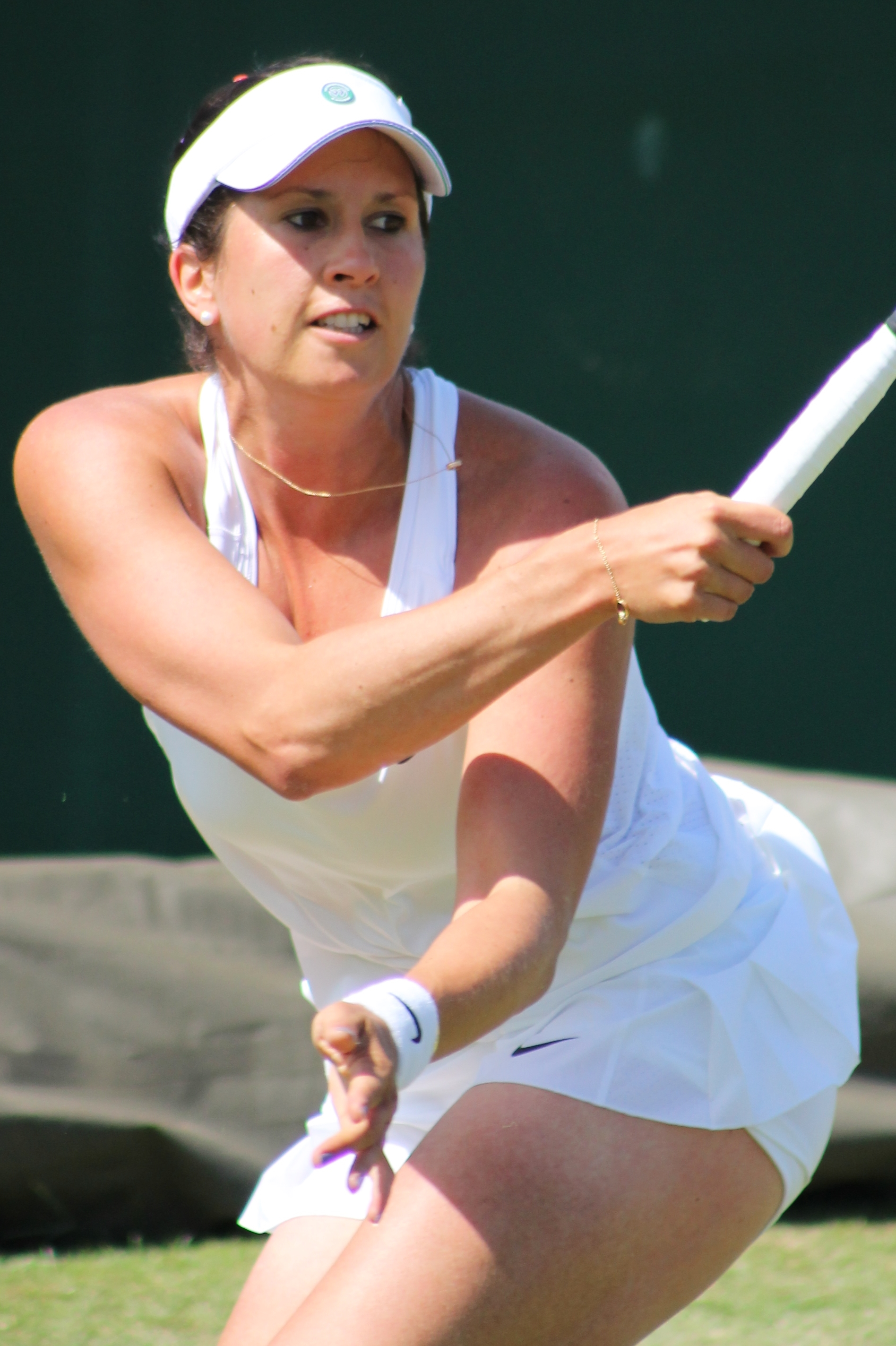 Arvidsson WMQ14 (9)